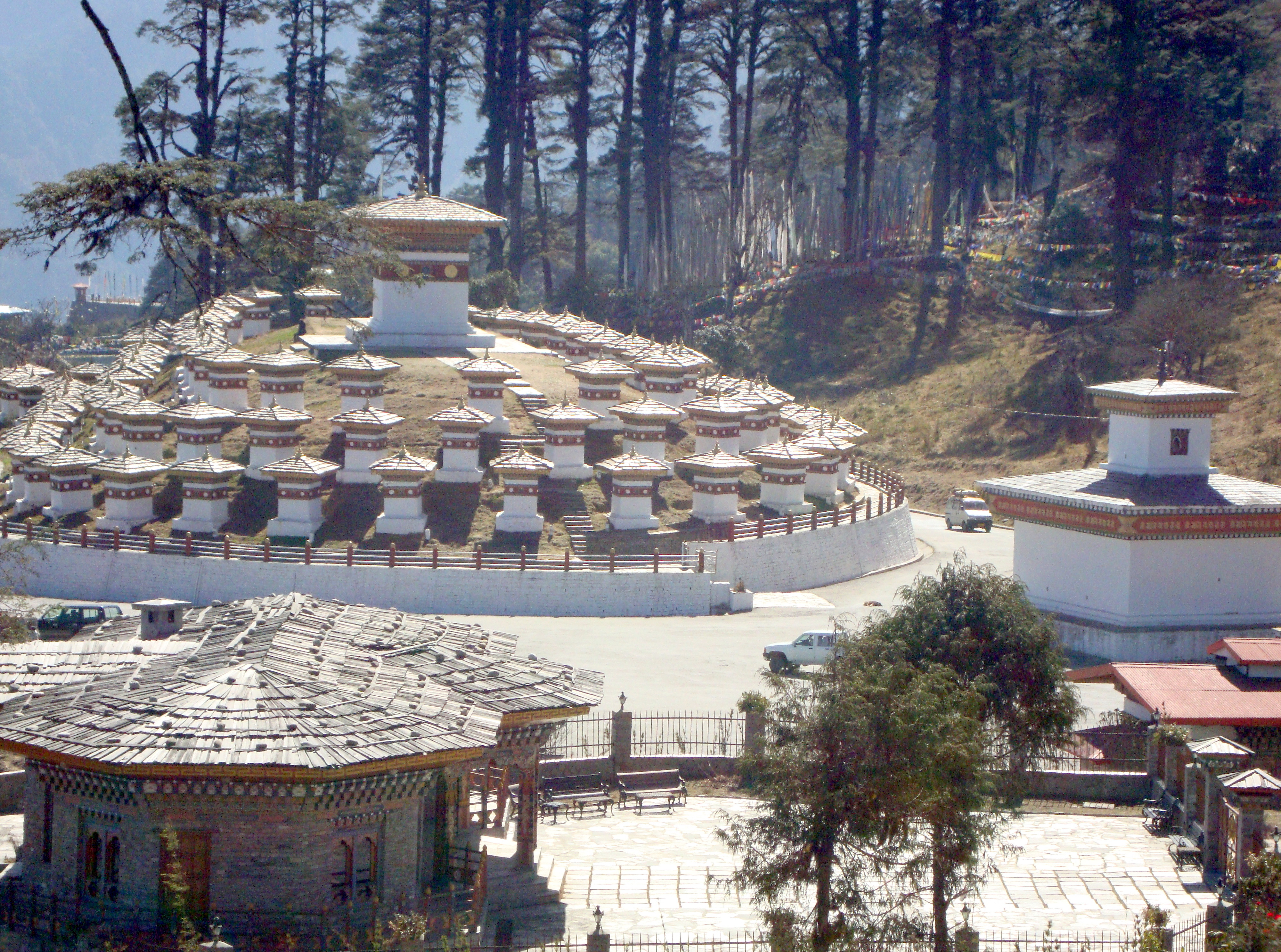 ഭൂട്ടാനിലെ ഒരു പ്രമുഖ ടൂറിസ്റ്റ് കേന്ദം. ദോചുള.